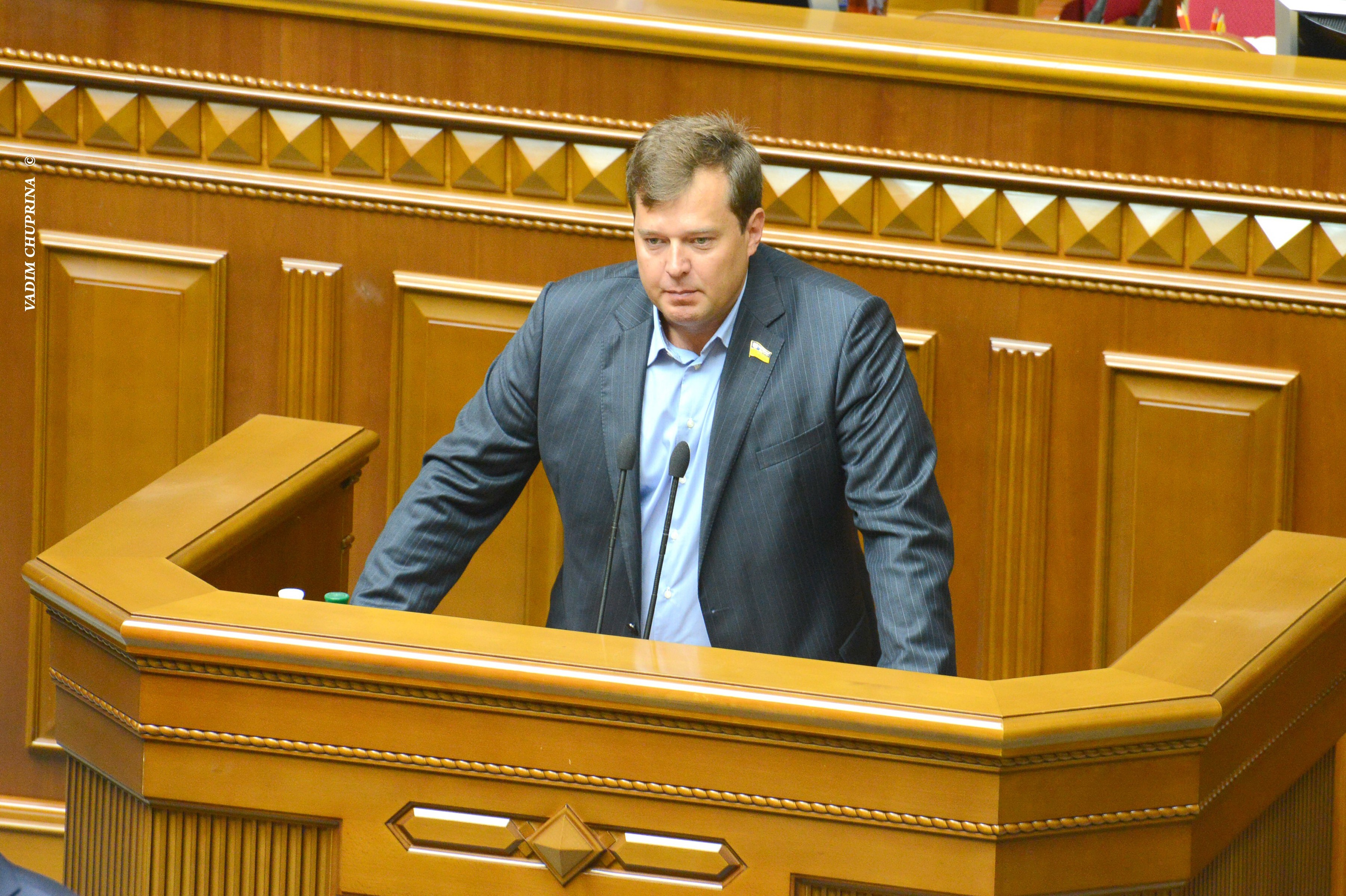 ВЕРХОВНА РАДА УКРАЇНИ 2013 , фото Вадим Чуприна ©